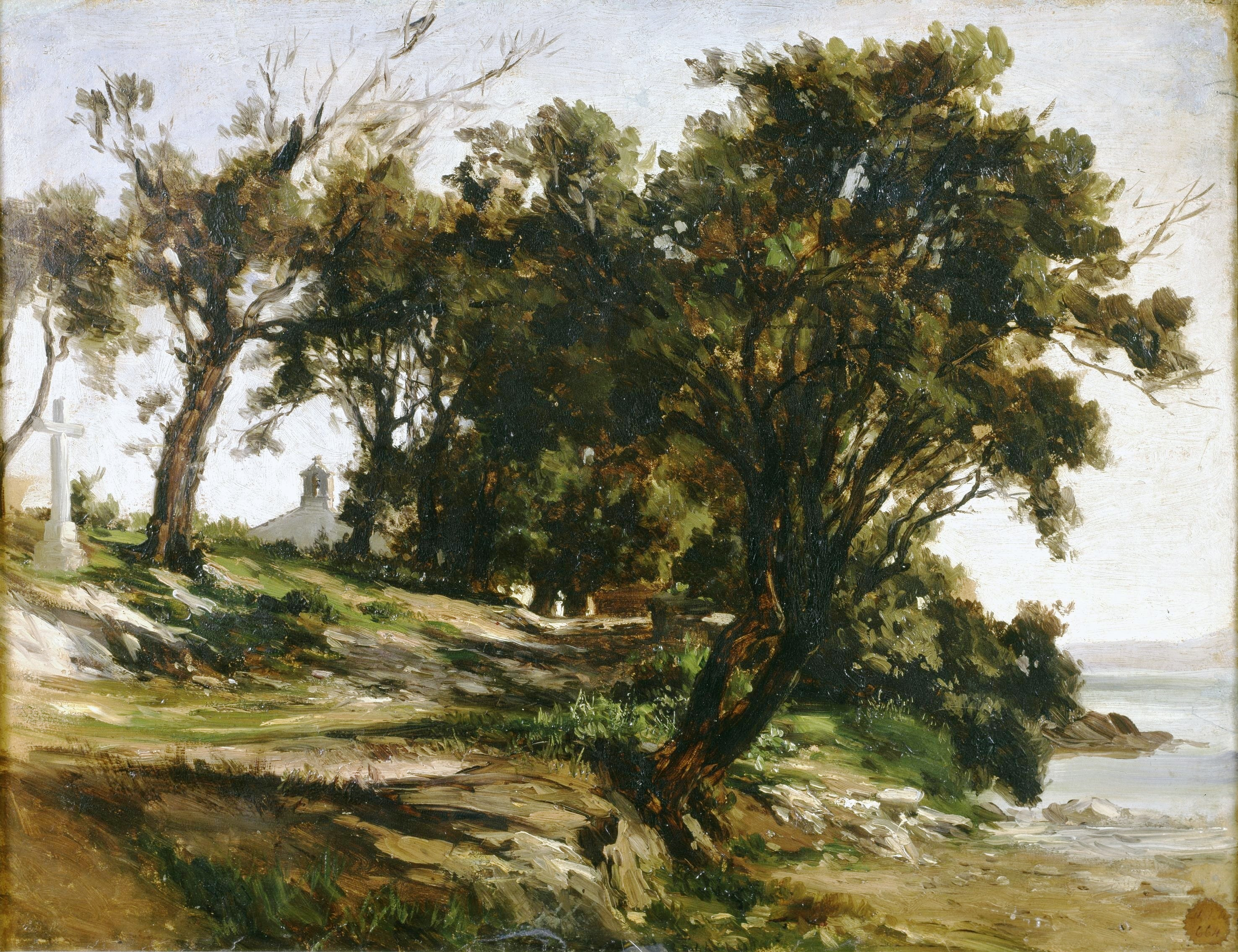 La obra representa una ermita situada en las cercanías de San Vicente de la Barquera, en España.